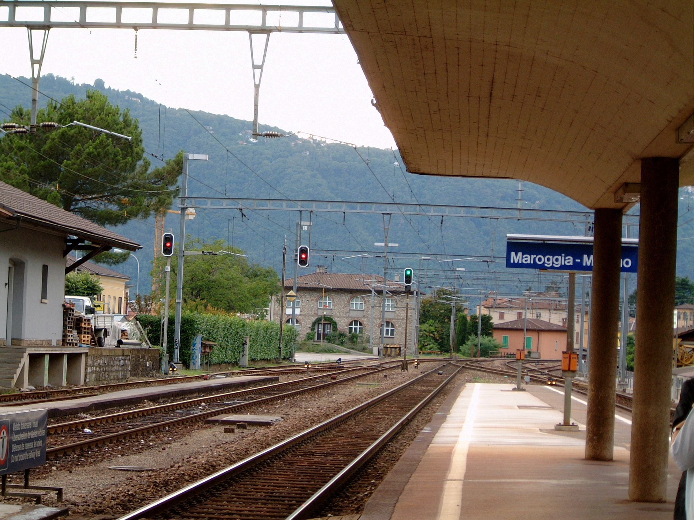 Beschreibung: Fotografie vom Bahnhof Maroggia-Melano Quelle: eigen Fotograf: Christian Heimann